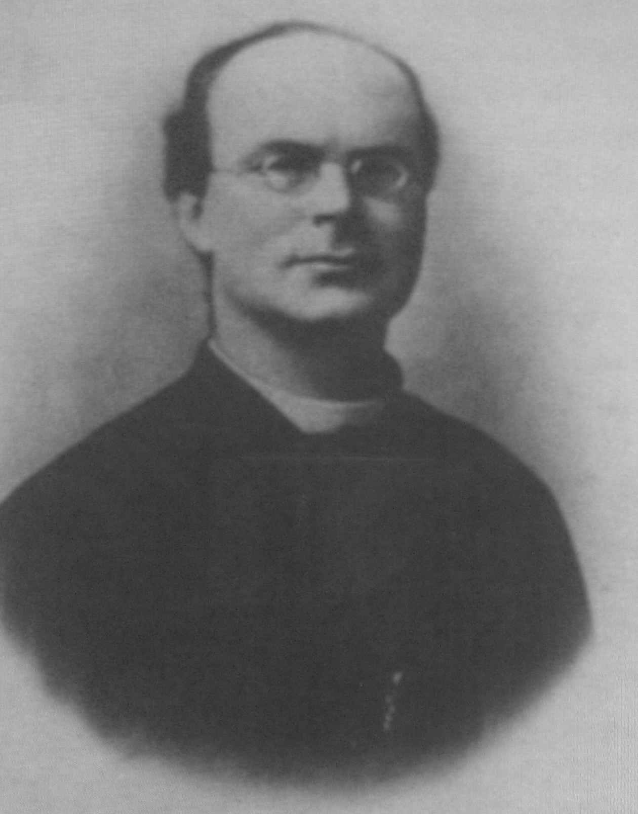 Achiel Lauwers - priester - Brugge - West-Vlaanderen - België